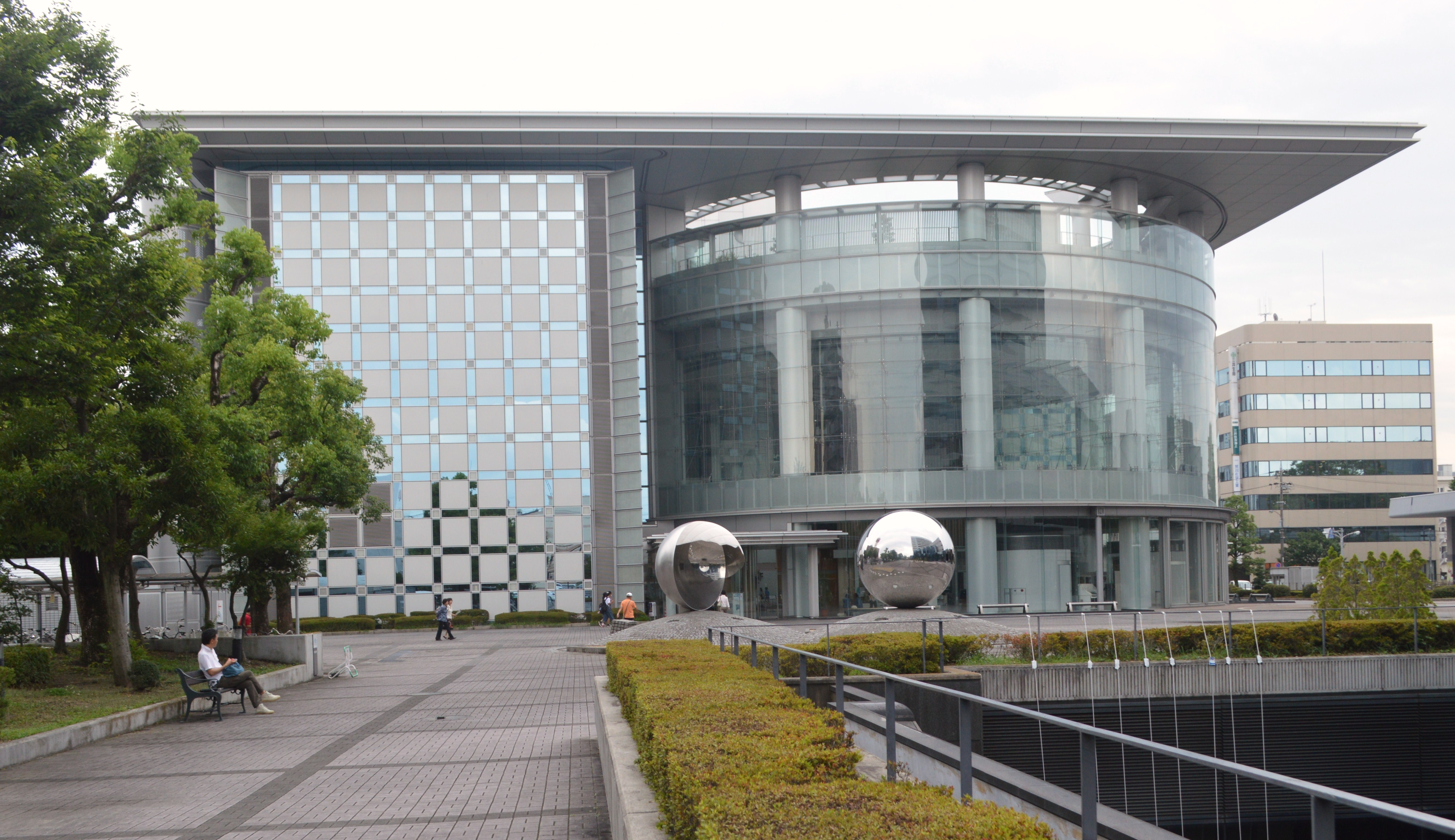 愛知県春日井市の文化フォーラム春日井内部。春日井市図書館を内包。